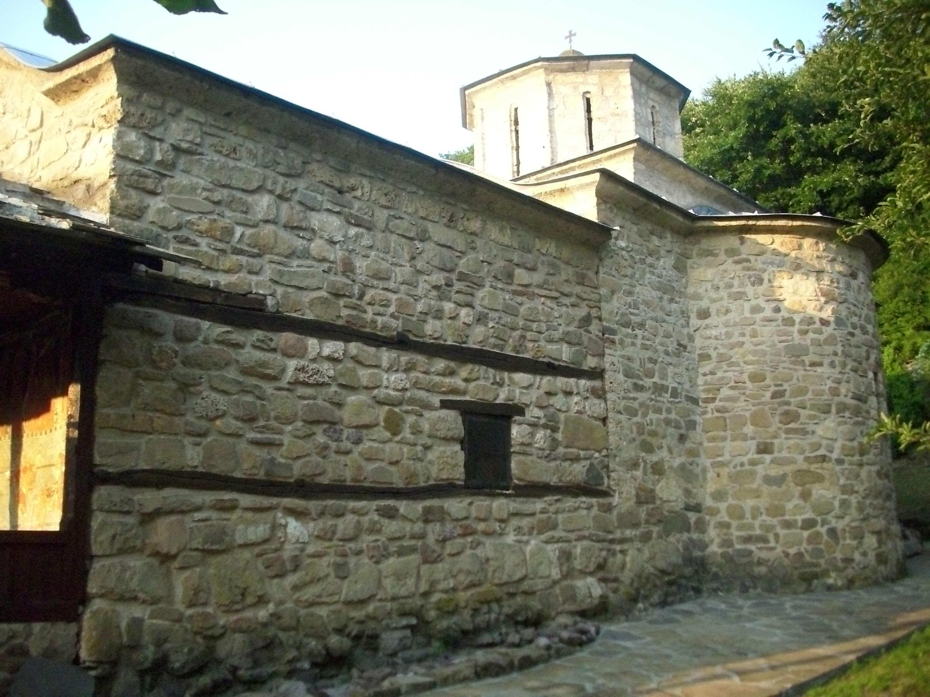 Манастир Темска (Манастир Св. Ђорђа)